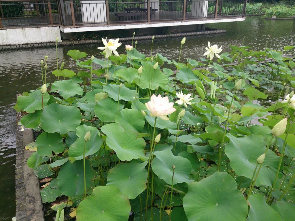 府中市郷土の森公園修景池大賀蓮